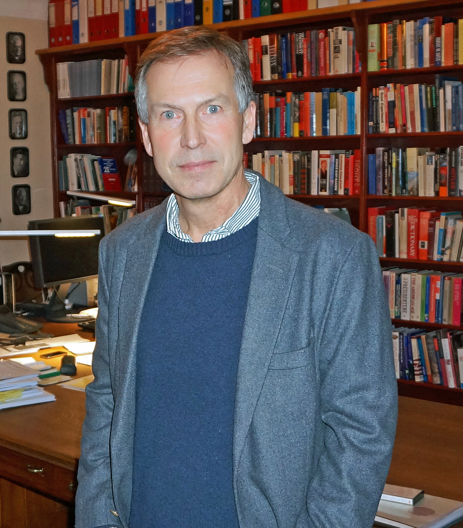 Direktør Olav Njølstad på Nobelinstituttets kontor 2015